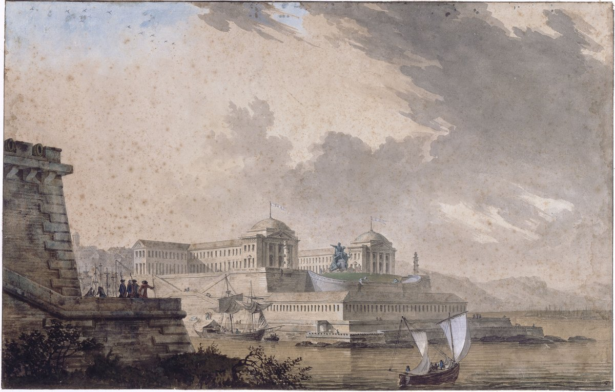 Vue perspective d'un projet de place pour Louis XVI Fin du XVIII siècle, aquarelle, gouache et plume, 32,5 x 54cm, Jallier de Savault remporte un concours d'architecture avec son projet en lieu et place du chateau. Il comporte l'édification d'une statue monumentale de Louis XVI à l'emplacement de la tour César «afin, qu'aucun bâtiment, petit ou grand, ne put entrer dans la rade, aucun mouvement se faire dans le port (...) sans que le roi les vît et y présidât en quelque sorte». En avril 1788, ce projet fut finalement jugé inconciliable avec les aménagements prévus par la Marine.